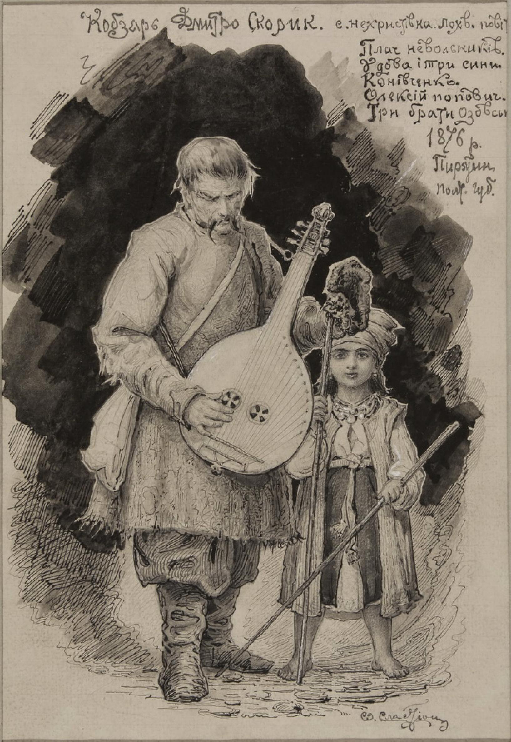 ПОРТРЕТ ХЛОПЦЯ-КОБЗАРЯ ПЕТРА, УЧНЯ І. КРЮКОВСЬКОГО 1876 р., туш, перо, пензель, олівець; 25,3 x 18. Внизу праворуч авторський підпис, дата — 1876 р. і напис: «Лохвиця — Приліпка Петро учень І. Крюковського».